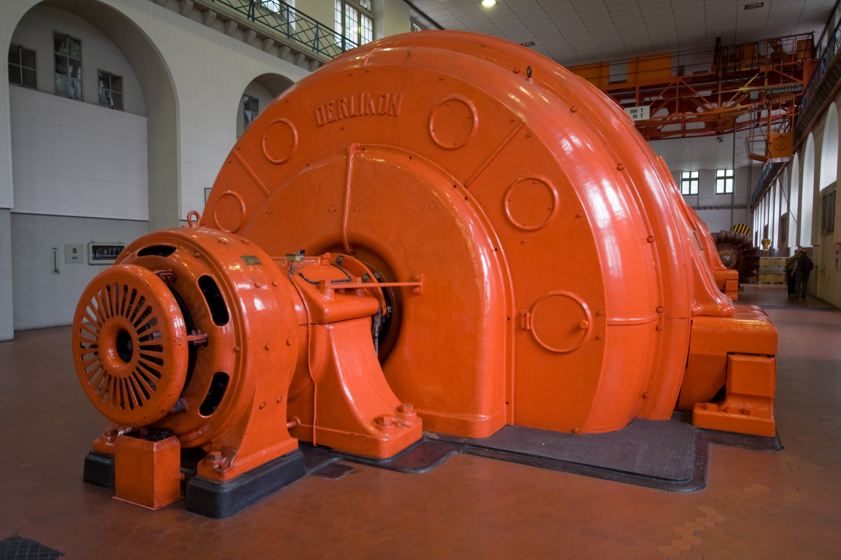 Erreger (links vorne) und Generator (hinten) / Exciter (front left) and generator (back)